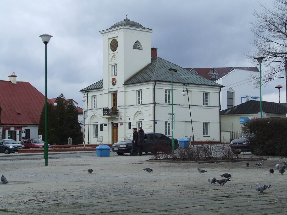 Piaseczno. Ratusz przy rynku